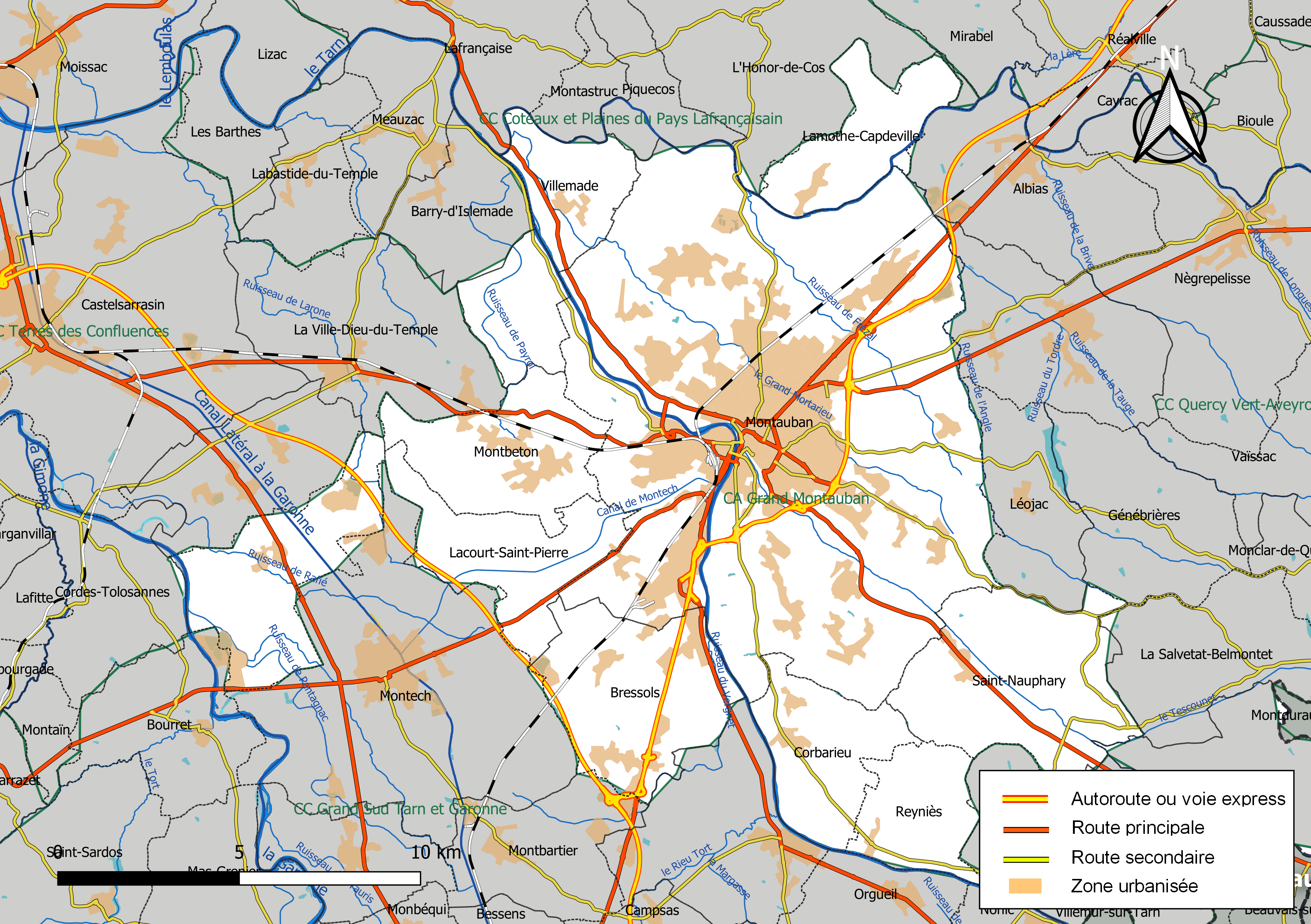 Carte géographique de l'intercommunalité Grand Montauban, département de Tarn-et-Garonne, France. Composition au 1er janvier 2019.